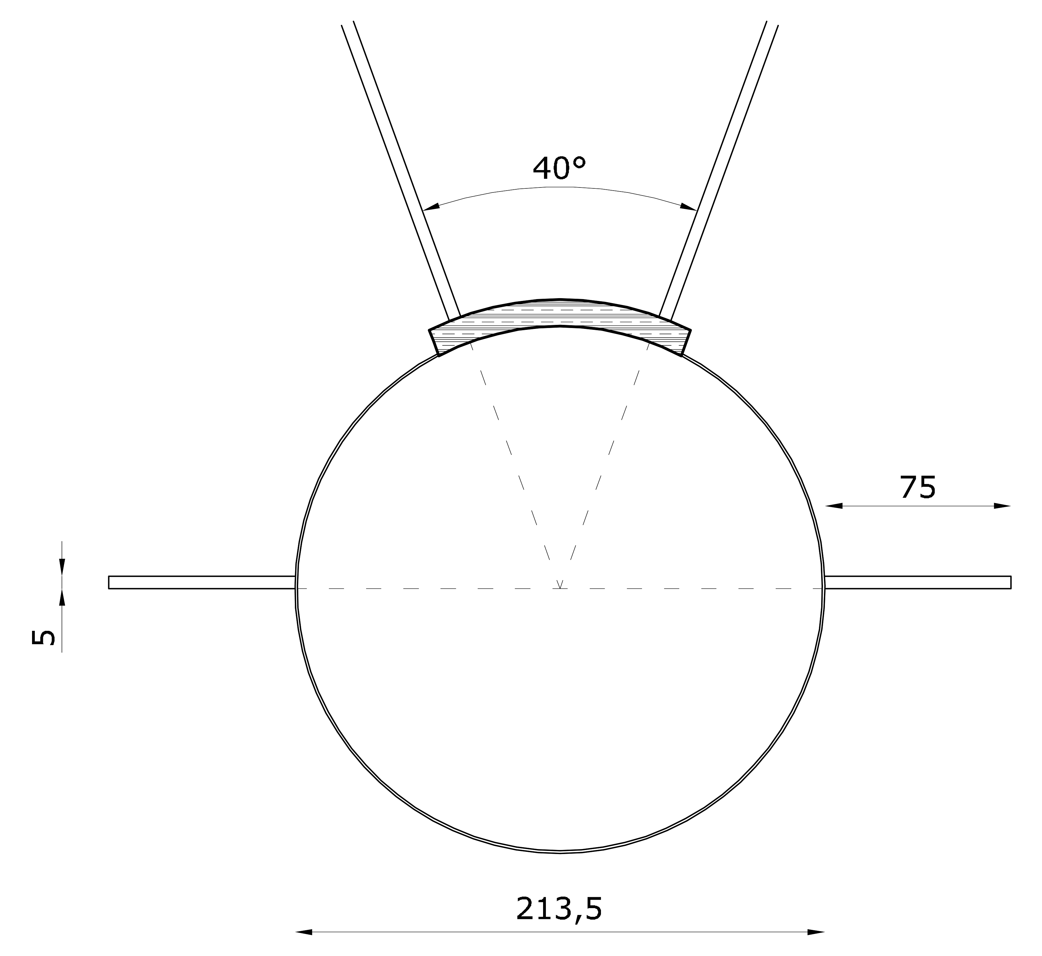 Vista in pianta di una regolamentare (secondo le norme del 1999) per il getto del peso